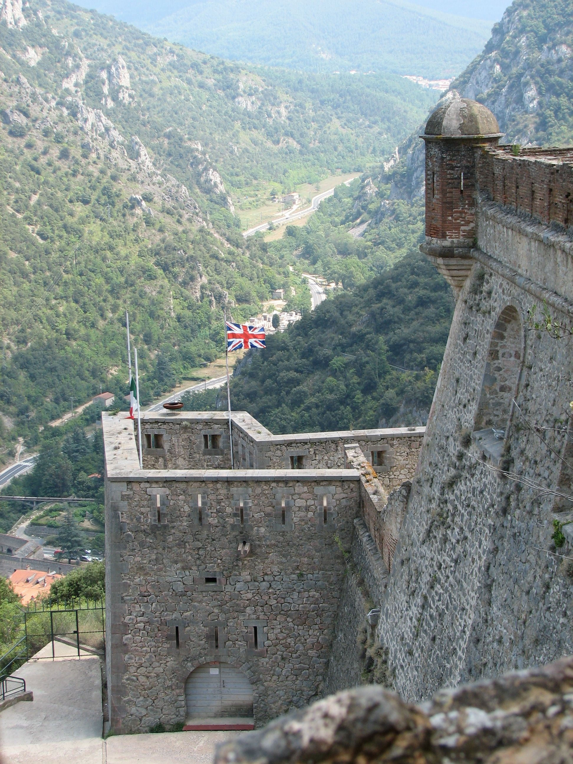 Fort Libéria: Ausblick von Fort nach NO